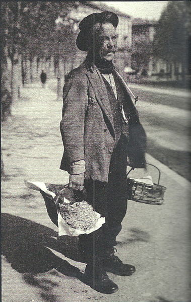 Autore:anonimo Fonte:Civico archivio fotografico Milano Descrizione:Milano, un venditore di rane (1930) Licenza d'uso:Foto non artistica scattata in Italia oltre 20 anni fa Note